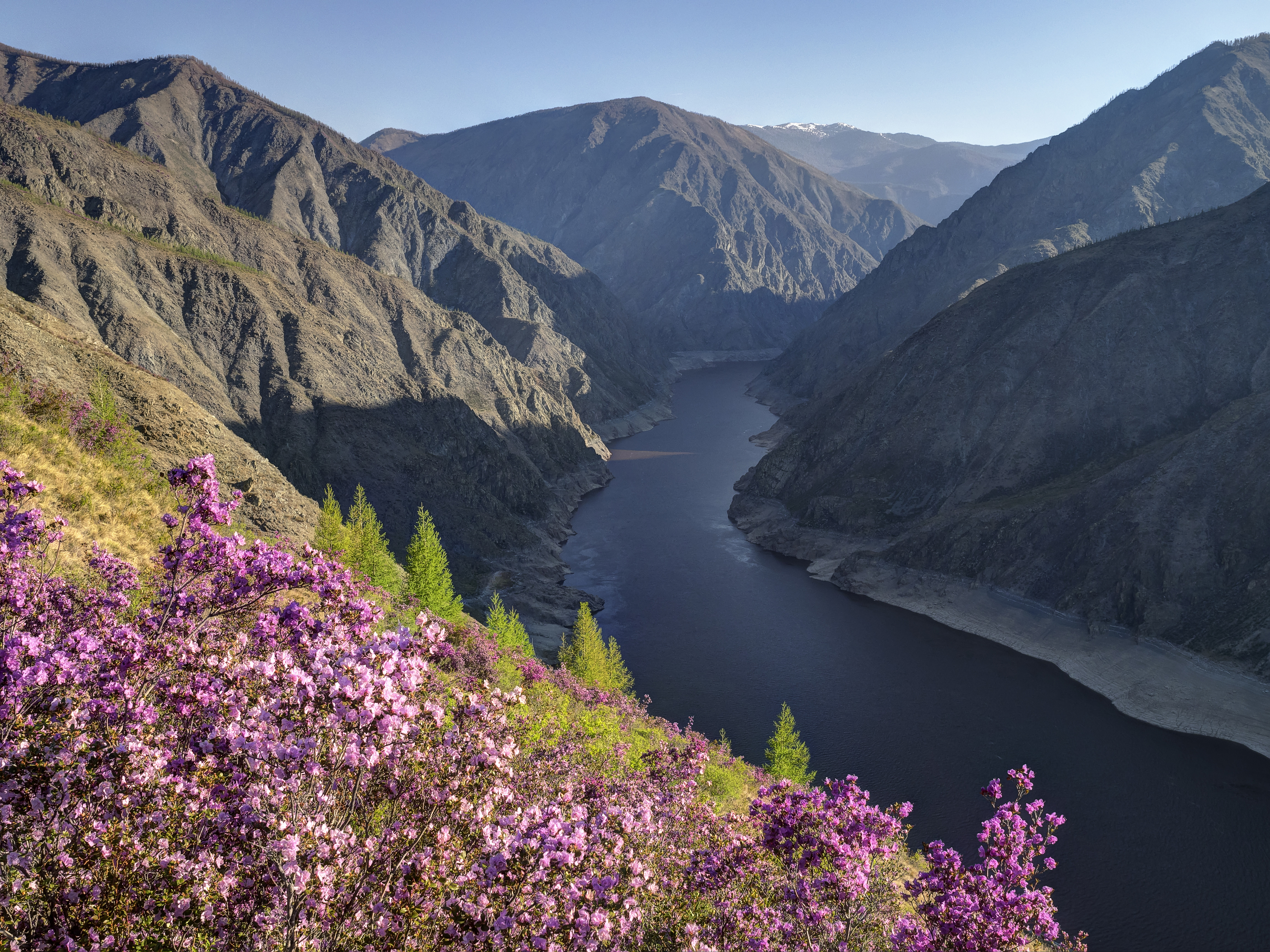 Саяно-Шушенский биосферный заповедник, река Енисей This image is related to the protected area of Russia number 2400090